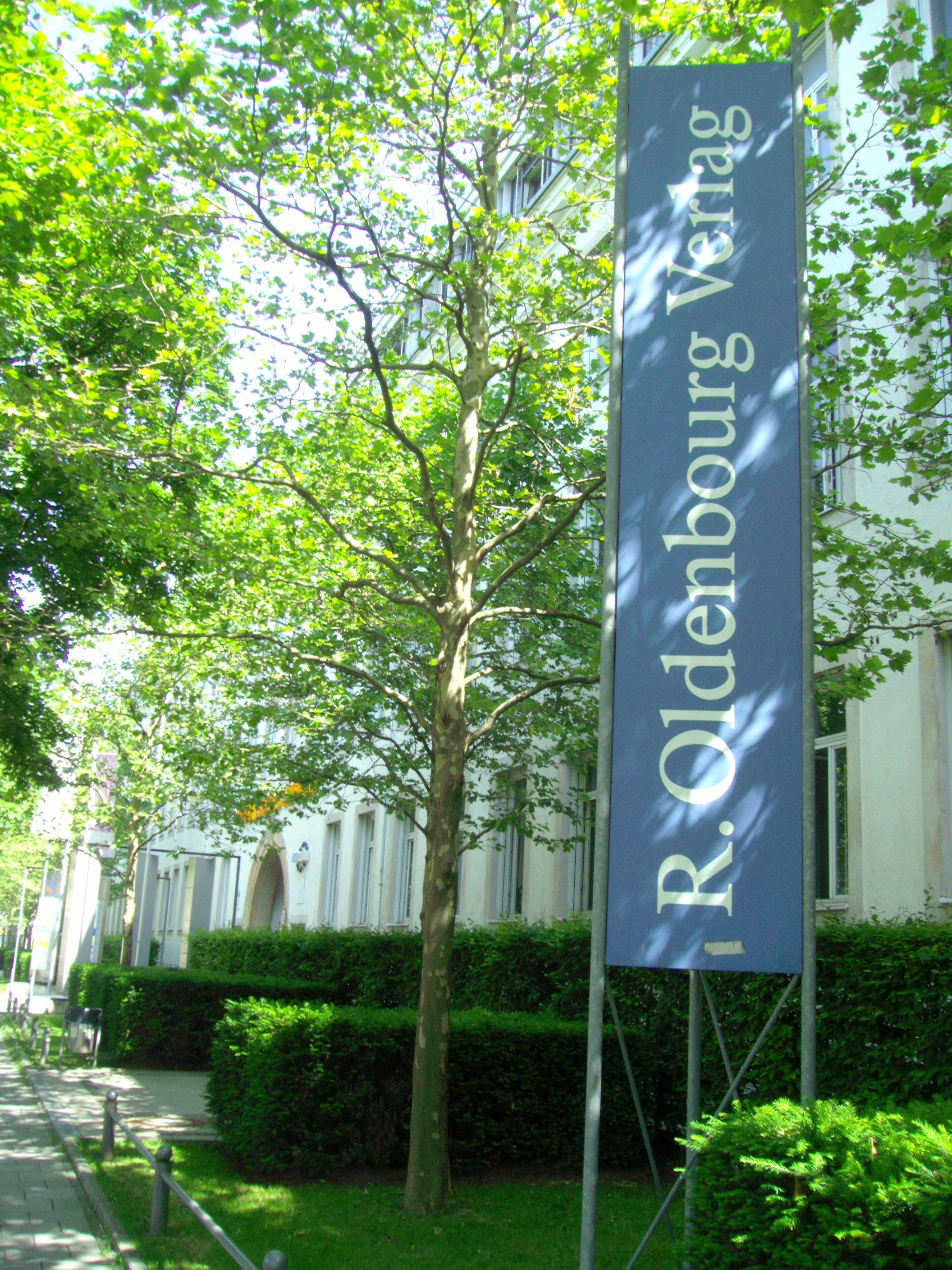 Sitz des R. Oldenbourg Verlages, München, Rosenheimer Str. 145